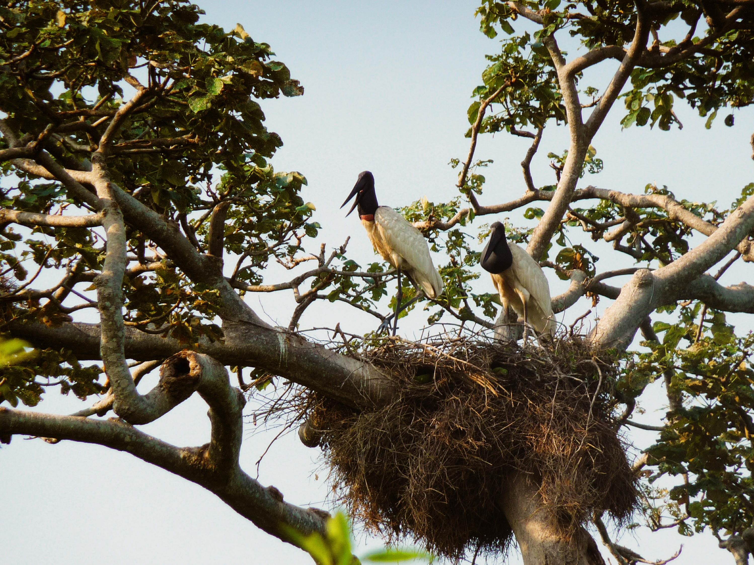 Animal fotografado em saída a campo para o Pantanal Brasileiro (MS)